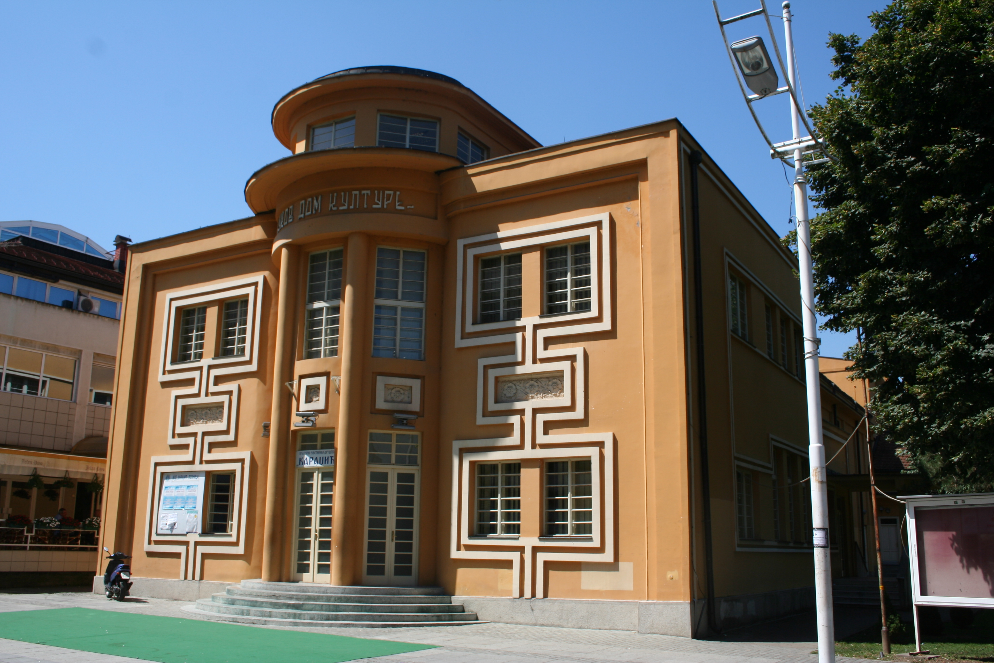 Vukov dom kulture, Loznica